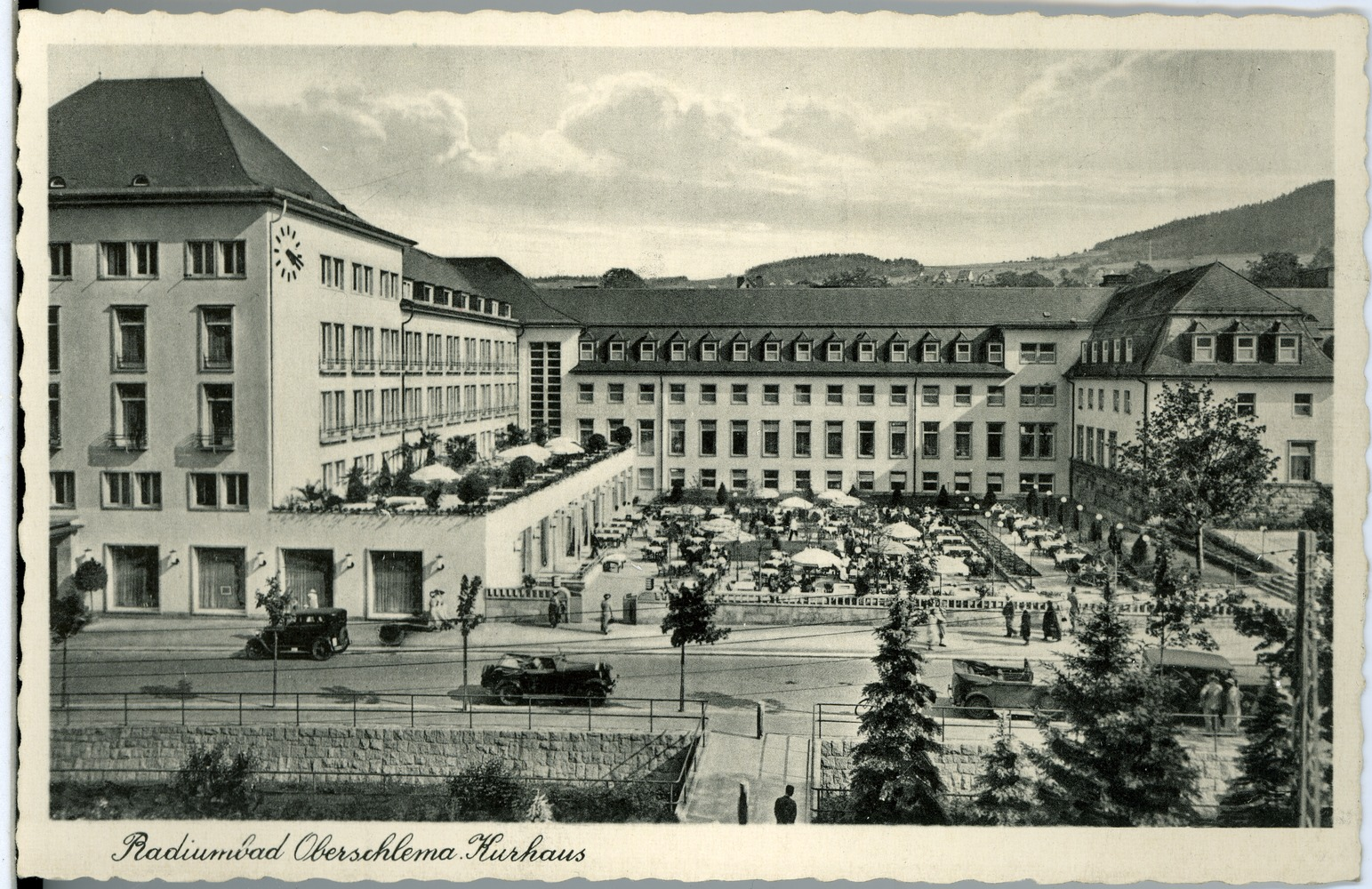 Oberschlema; Kurhaus This postcard is from publisher Brück & Sohn in Meißen ( postcard has a unique number 26844 and is available in a higher resolution at the publisher. This images was uploaded in a cooperation project between Wikipedians and the publisher.